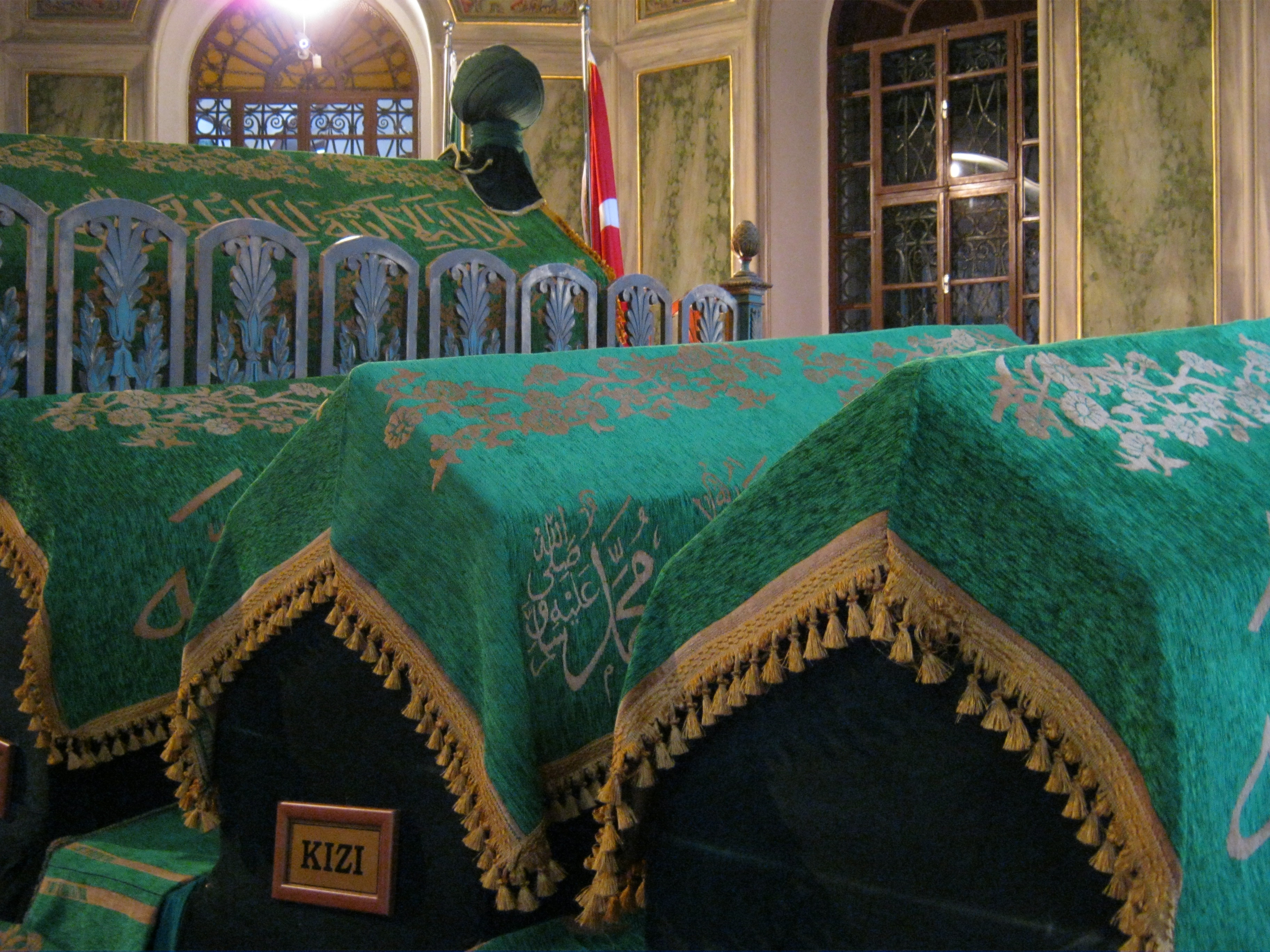 emirsultan türbesi bursa